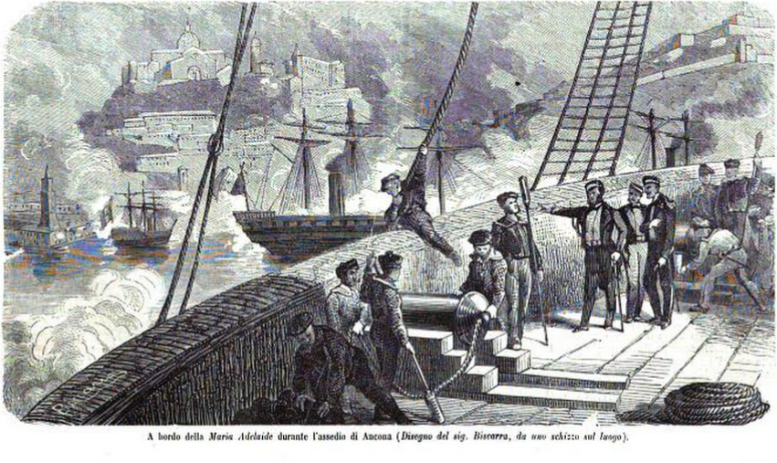 Ancona assedio 1860 Maria Adelaide nave. Disegno del 1860